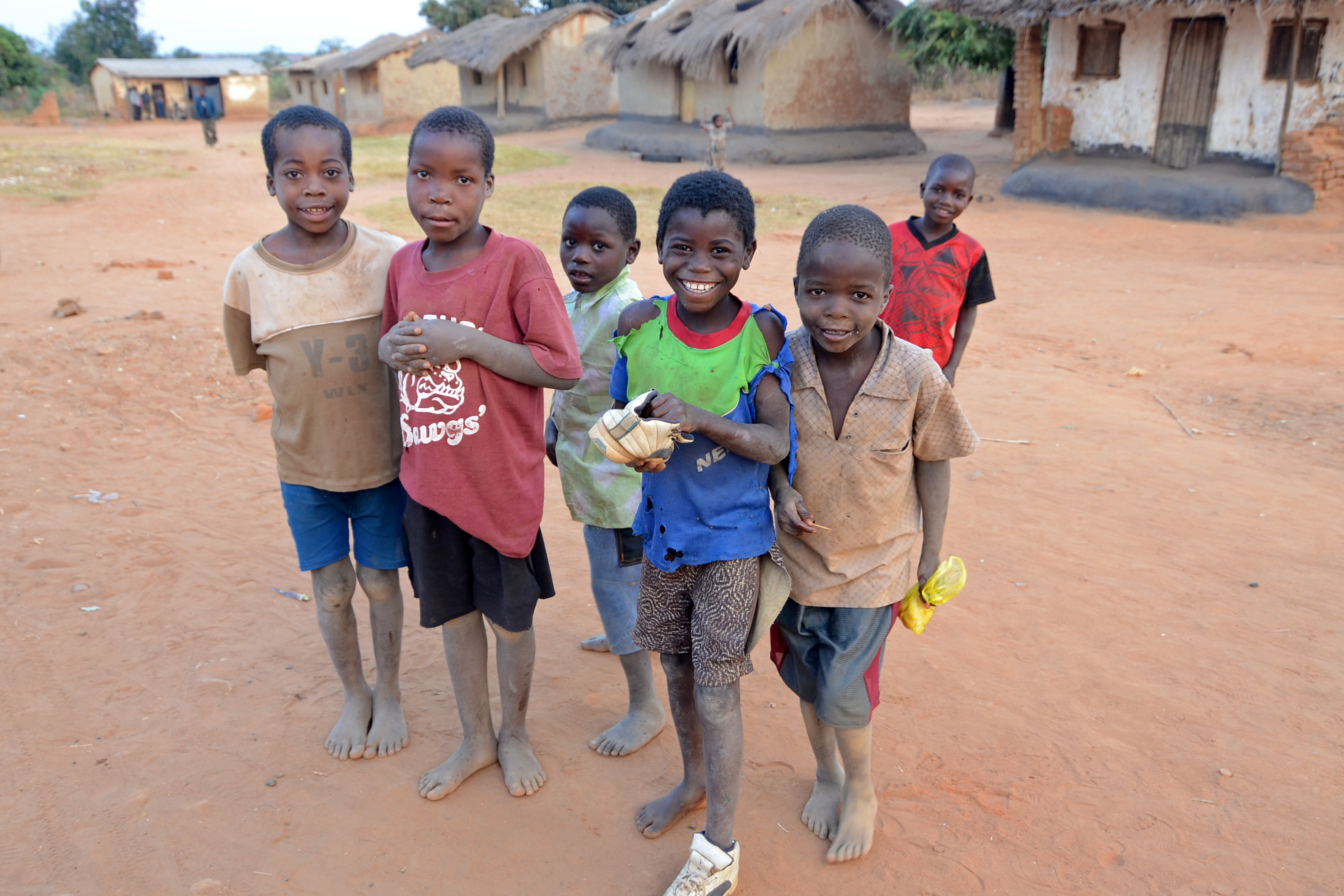 Chilowamatambe, Kasungu district, Malawi